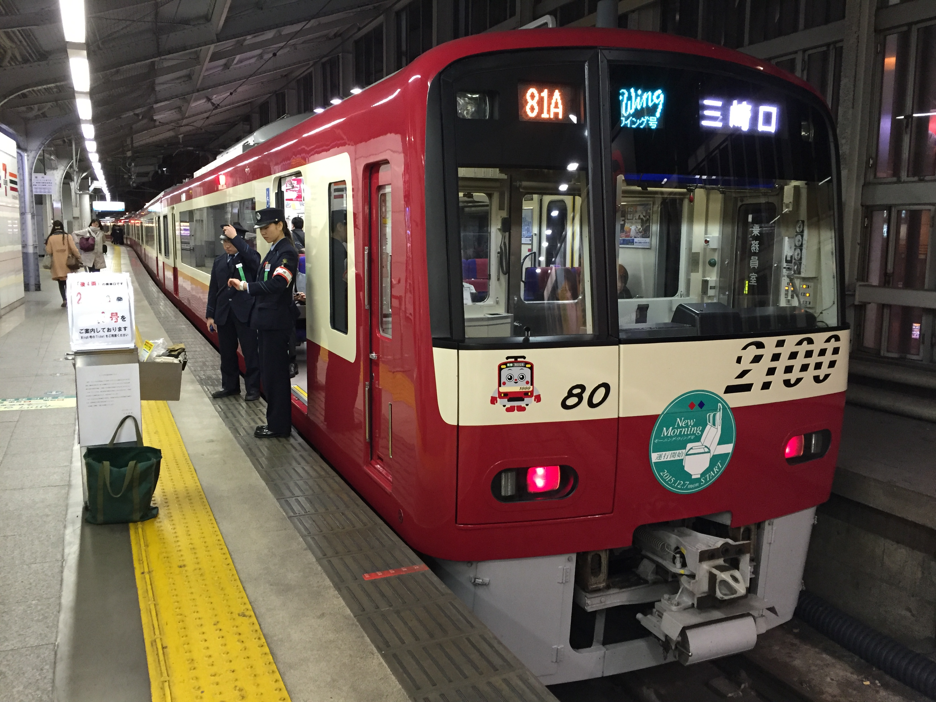 品川駅に停車中のウィング6号三崎口行き